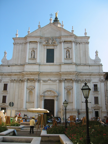 Duomo di Lonato, Brescia